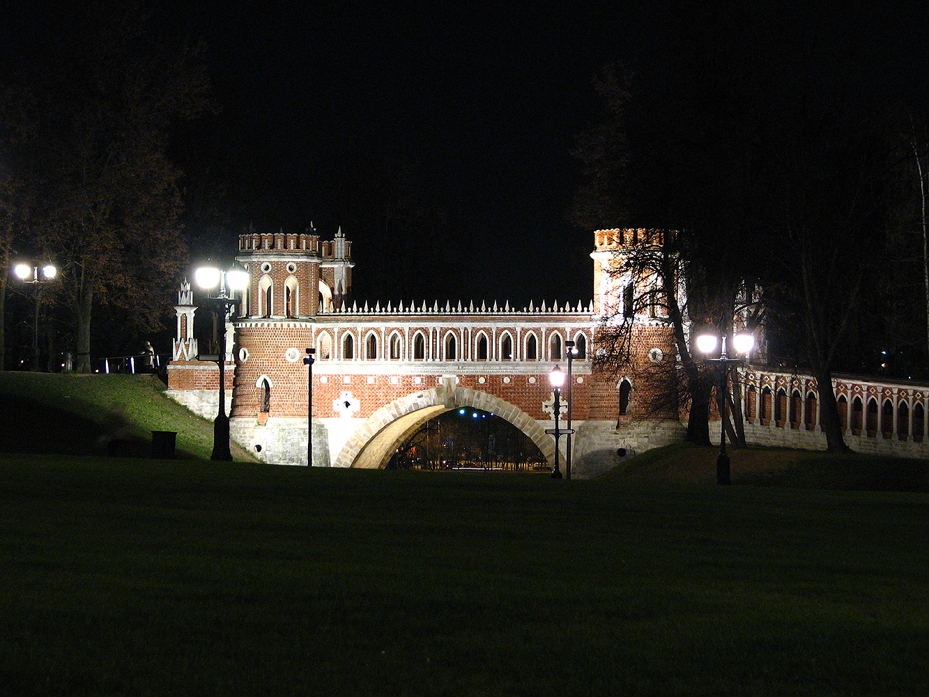 Фигурный мост ночью